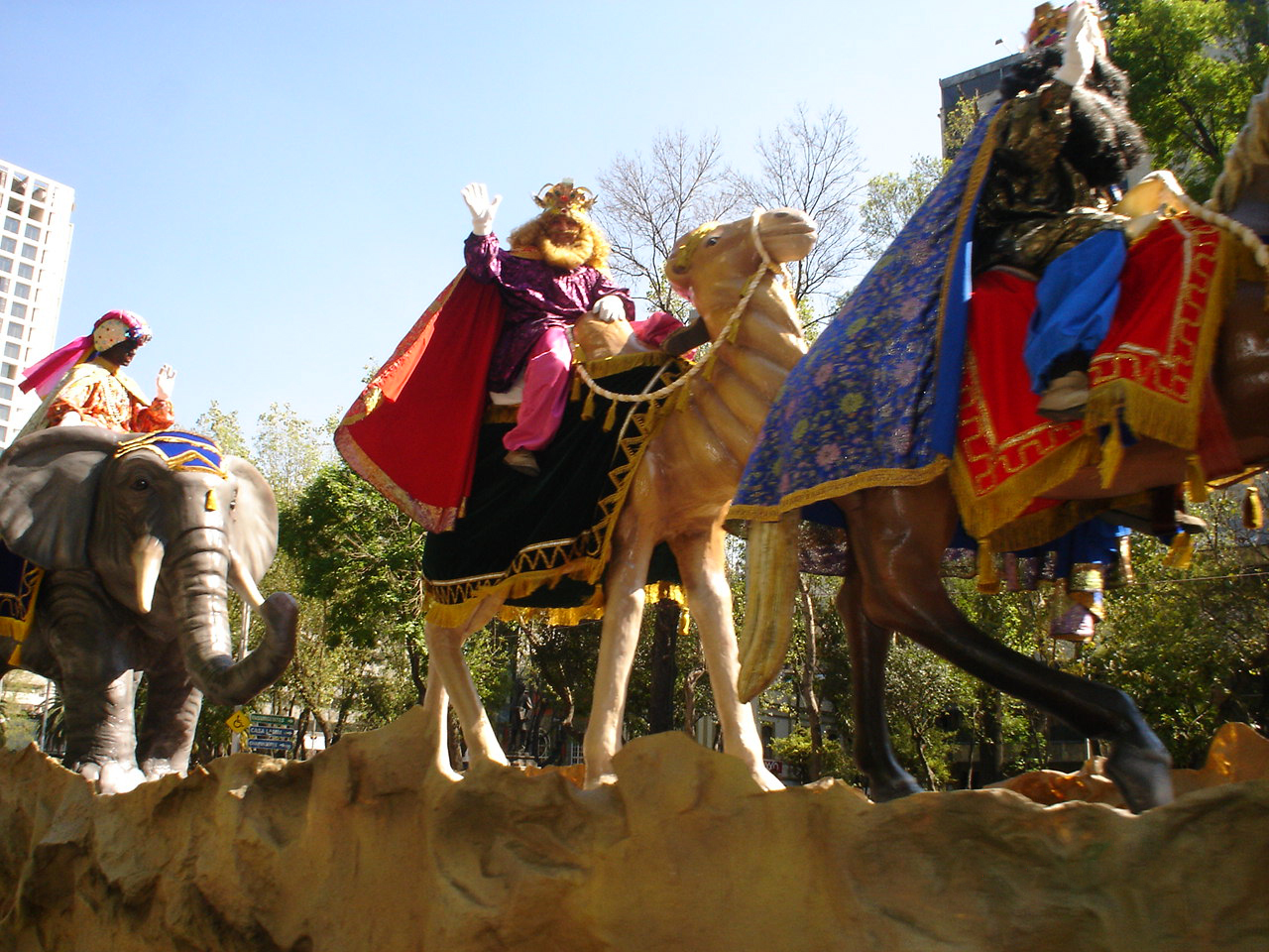 REYES MAGOS EN MEXICO